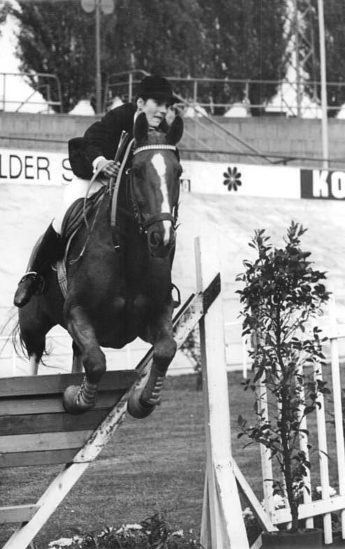 Ilona von Alkier Zentralbild Wendorf Pr.-20.3.1968- Berlin:Deutsche Pferdesport-Meisterschaften der DDR vom 20.-22.3.1968-Ilona v. Alkier (SC Dynamo Hoppegarten) auf Artus erzielte mit 8 Fehlern und 33,5 s eine sehr gute Teit. Information-1. Qualifikationprüfung für die Deutsche Damen-Springmeisterschaft der DDR in der Klasse M am 20.3.1968 in Berlin- Weißensee.